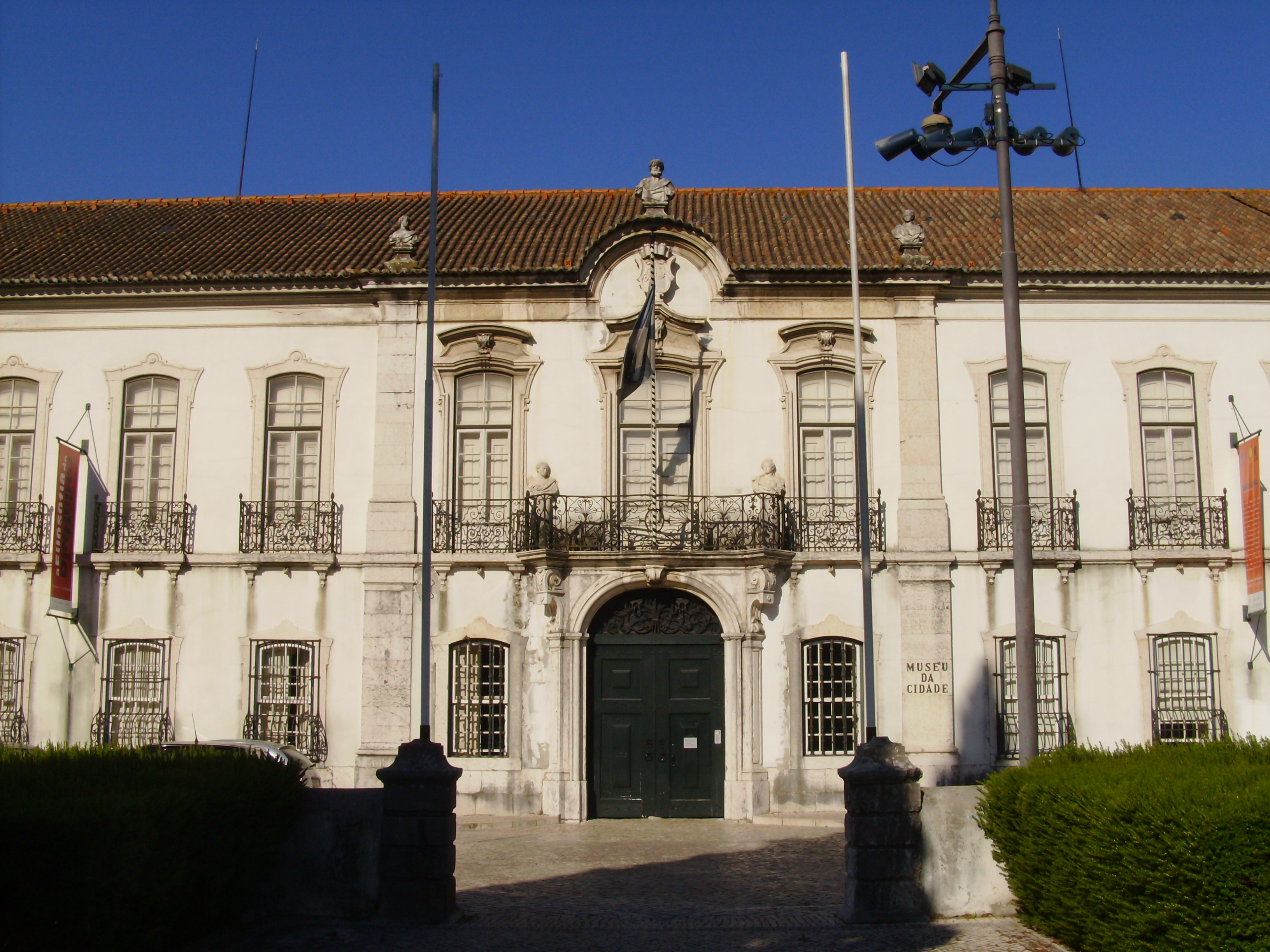 Museu da Cidade de Lisboa, Campo Grande, Lisboa, Portugal: fachada do Palácio Pimenta.